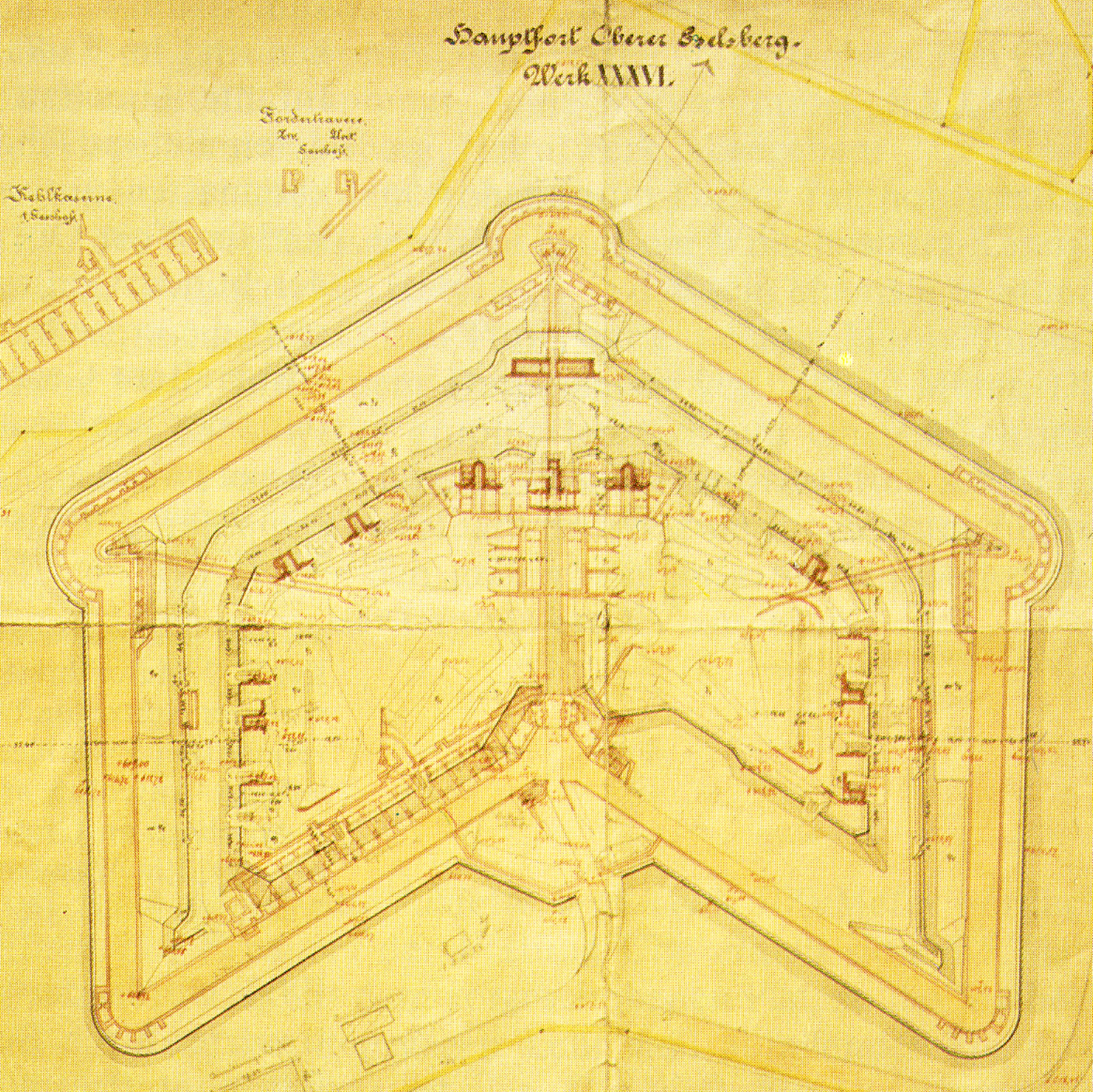 Plan des Fort Oberer Eselsberg der Bundesfestung Ulm